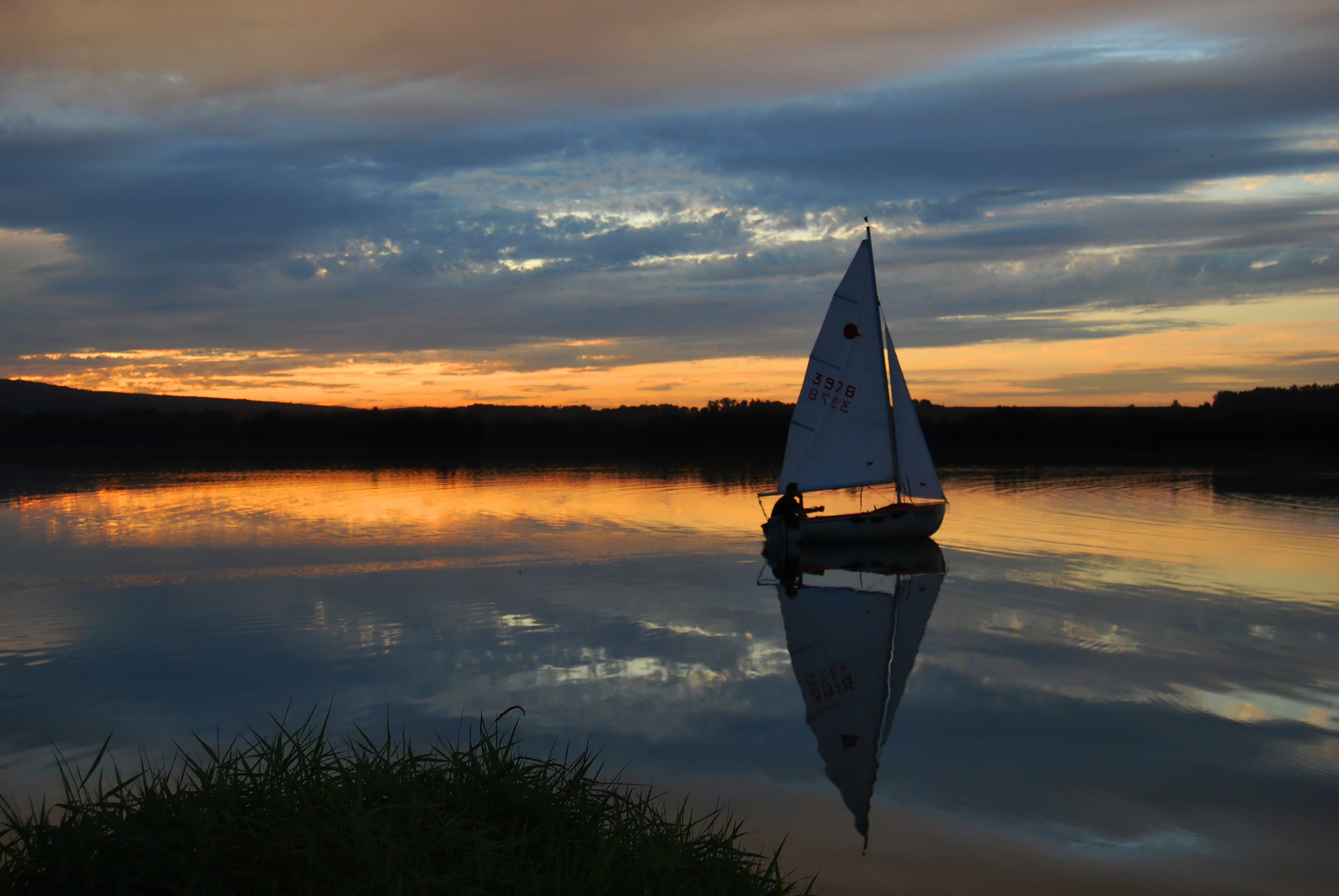 Segelboot auf dem Singliser See bei Borken